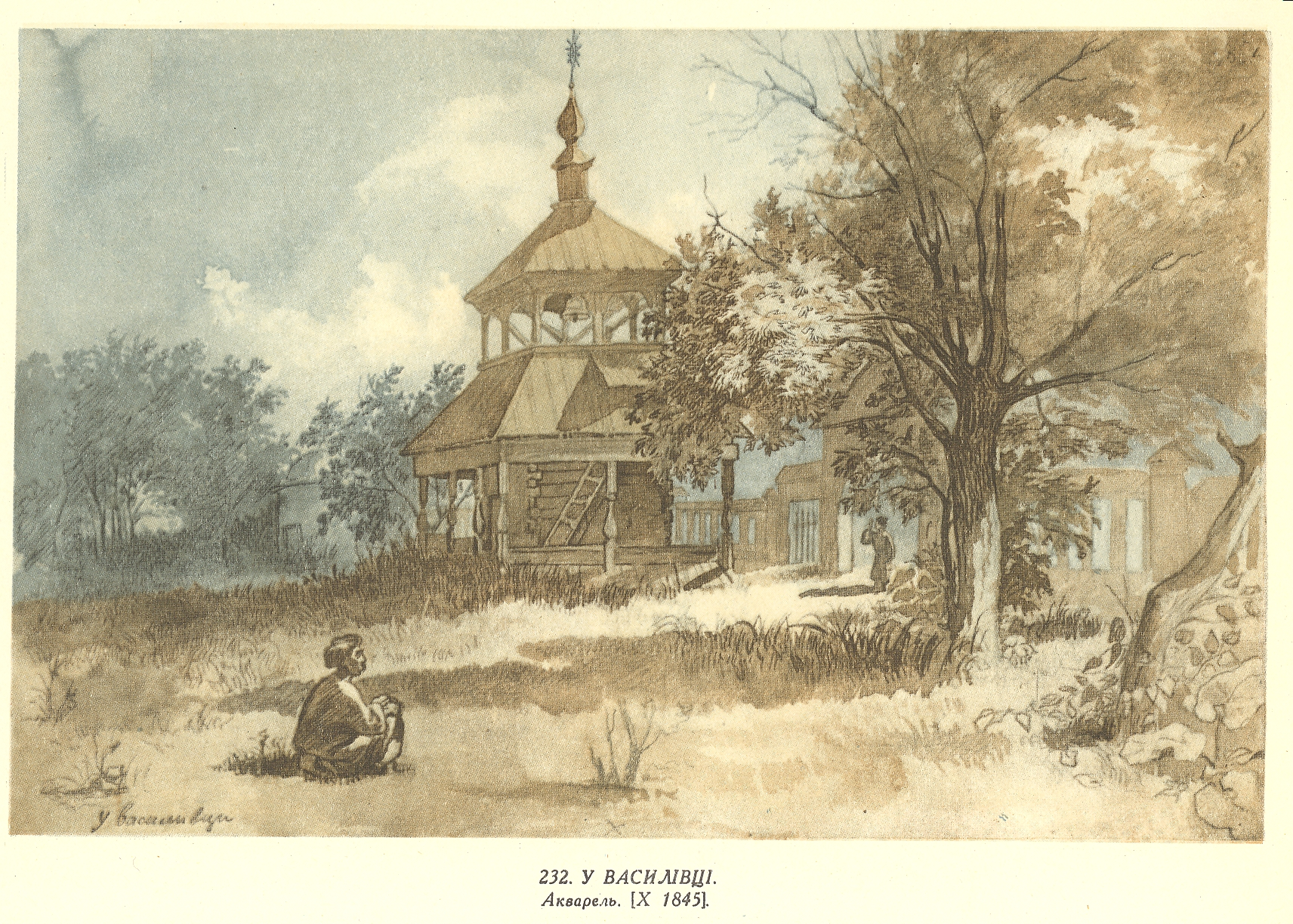 Тарас Шевченко. Повне зібрання творів в десяти томах. — К., 1961. — Т. 7: Живопис, графіка 1830-1847. — Кн. 1-2.